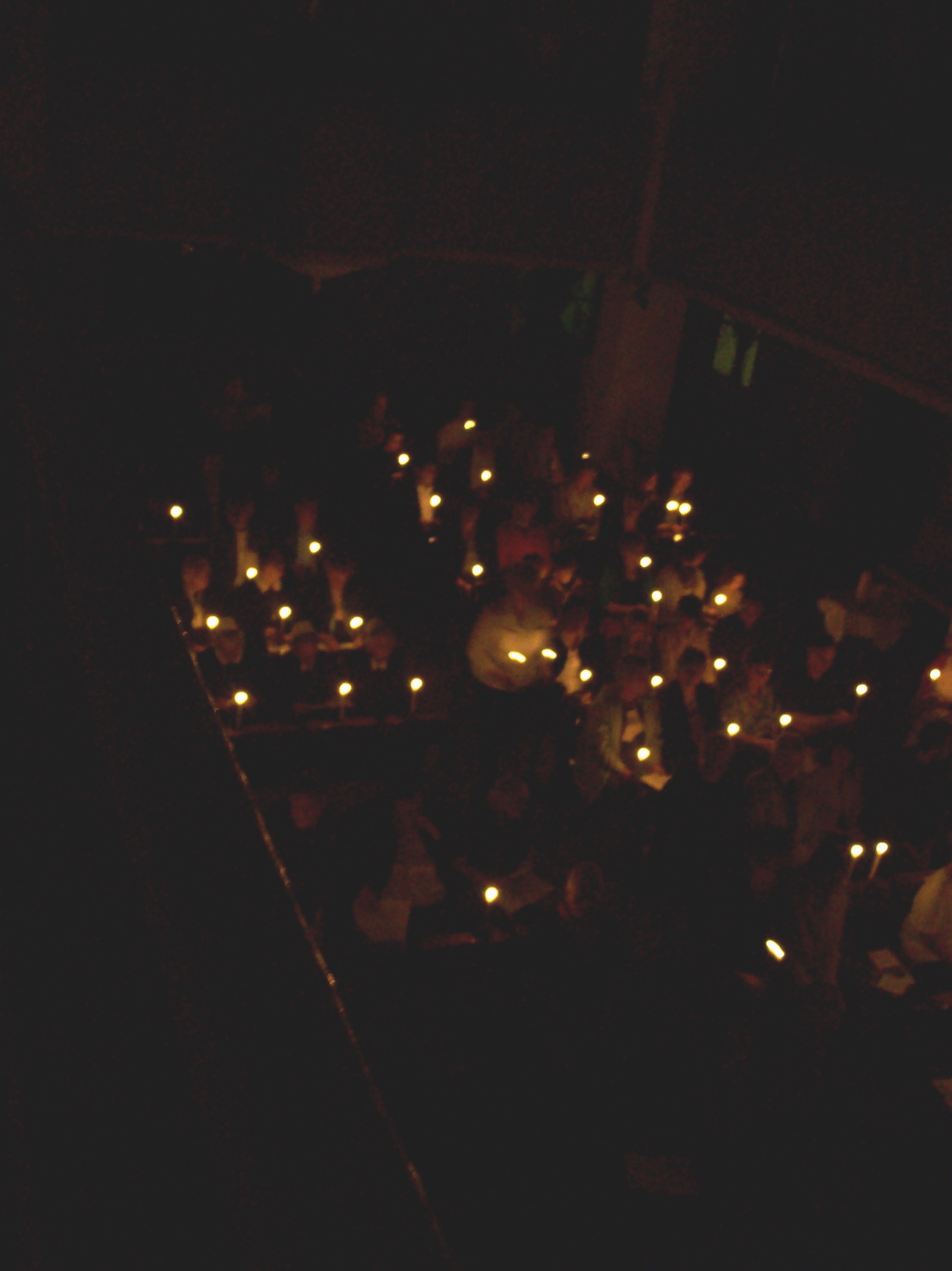 Osternachtfeier in der Kirche der kreuznacher diakonie. Die Gemeinde hat ihre kerzen an der Osterkerze angezündet und hört das Osterevangelium.